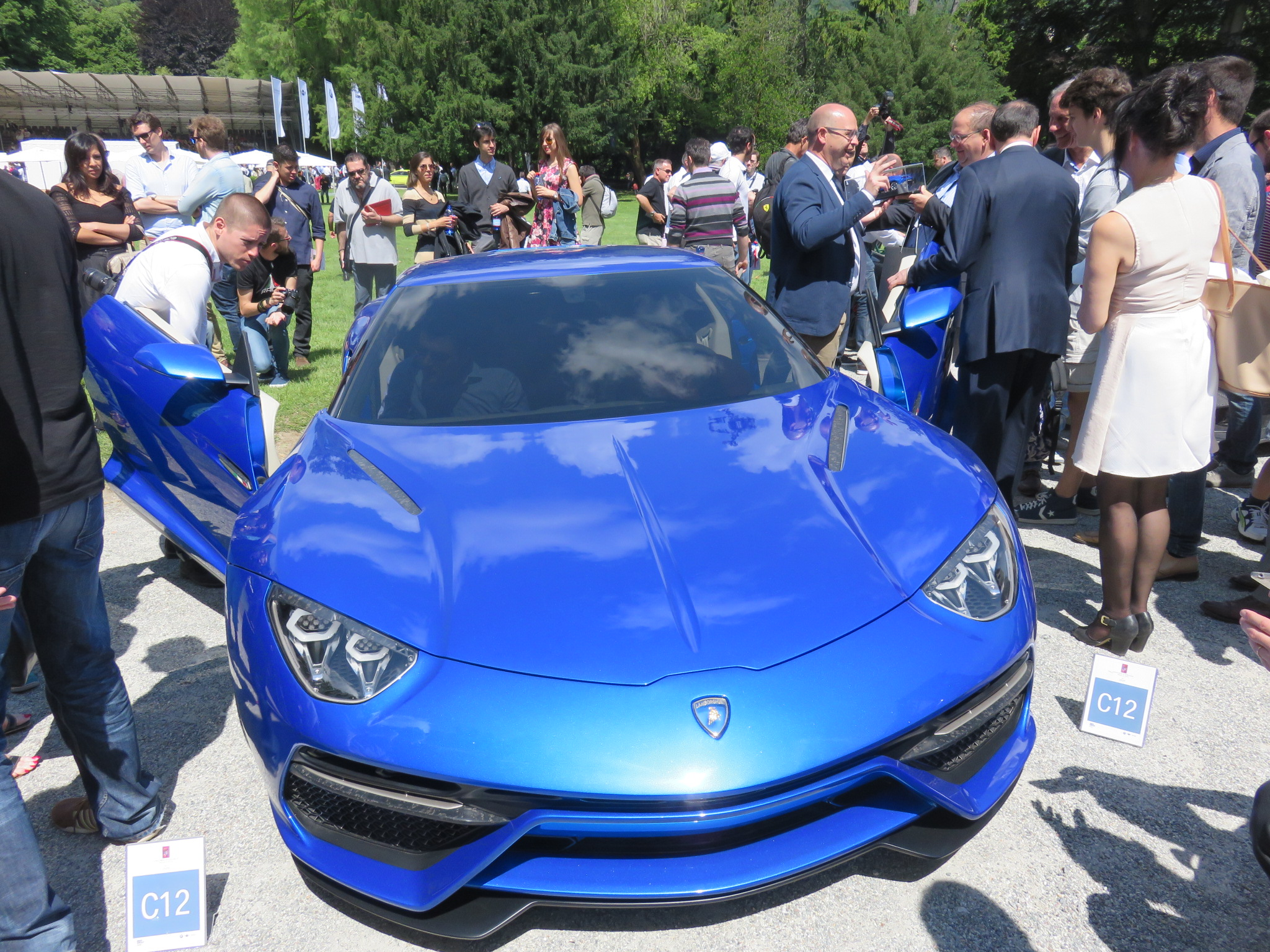 Lamborghini Asterion LPI910/4, Concours d'élégance Villa d'Este 2015